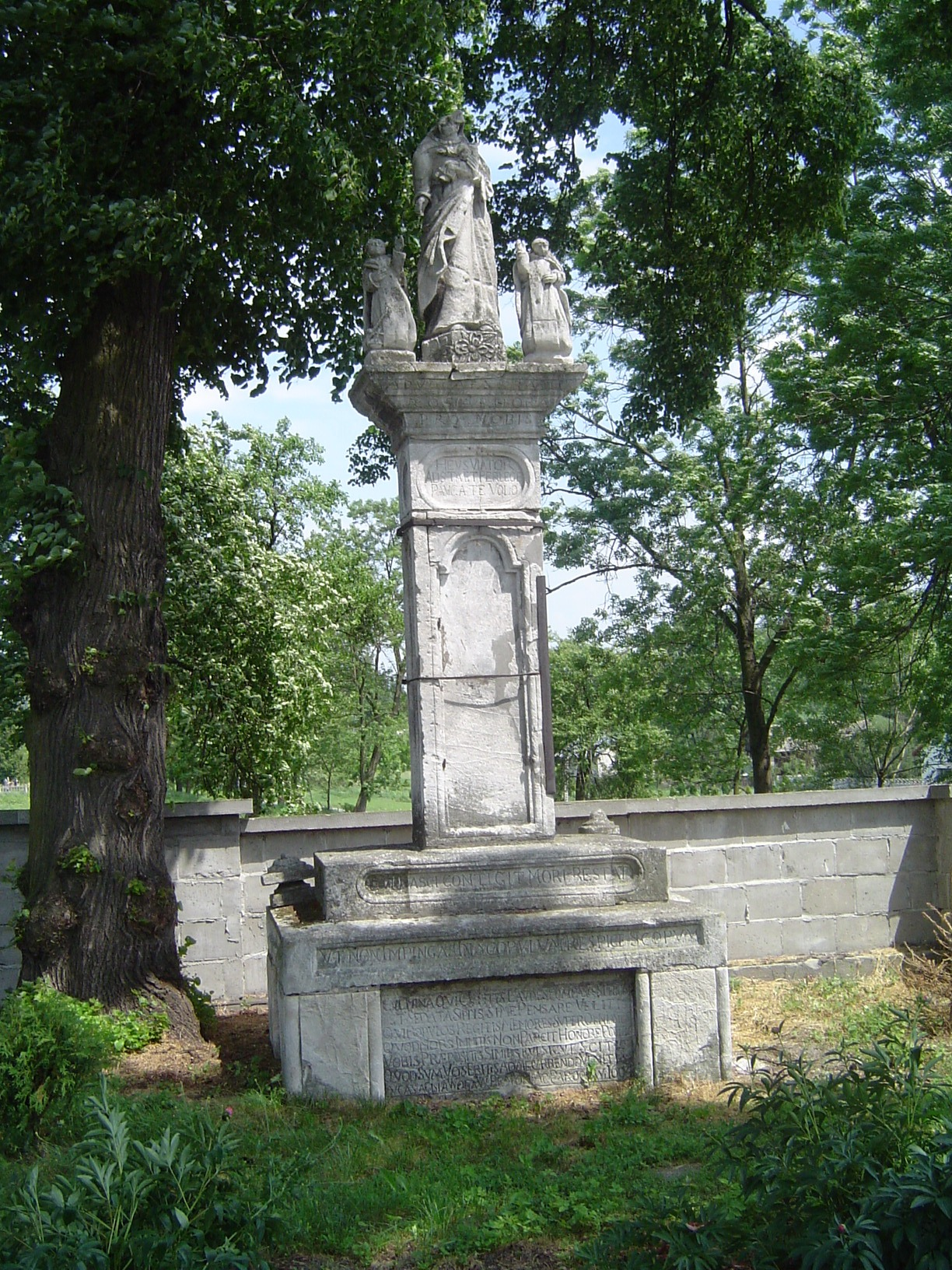 Kamienna figura z 1694r. wzniesiona na pamiątkę ustanowienia Różańca. Masywny dwustopniowy postument opatrzony inskrypcjami podtrzymuje czworoboczny słup zdobiony płycinami i rytymi napisami, z głowicą w formie wydatnego, profilowanego gzymsu. Powyżej grupa rzeźb - Matka Boska z Dzieciątkiem adorowana przez śś. Dominika i Katarzynę. Figura uszkodzona w czasie walk w 1945r., odnowiona, spięta klamrami